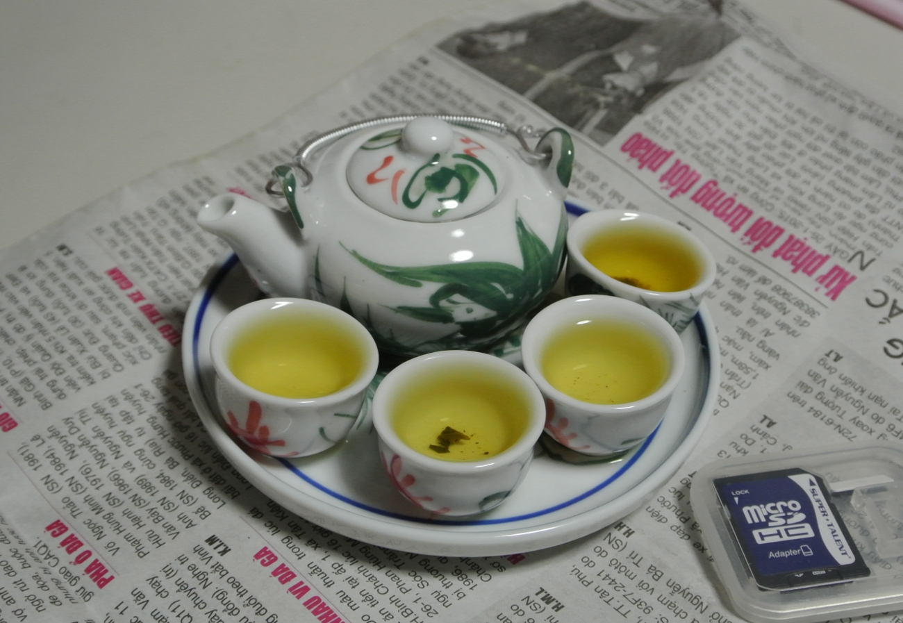 ベトナムの茶器。急須と茶碗と盆がセットになっているものが多く、茶碗は中国同様ひとくち呑みサイズである。これは特におみやげ用に小ぶりに作ってあるもの（右下はサイズ比較用のSDカード）。2015年にチョロンのビンタイ市場で50,000VND。